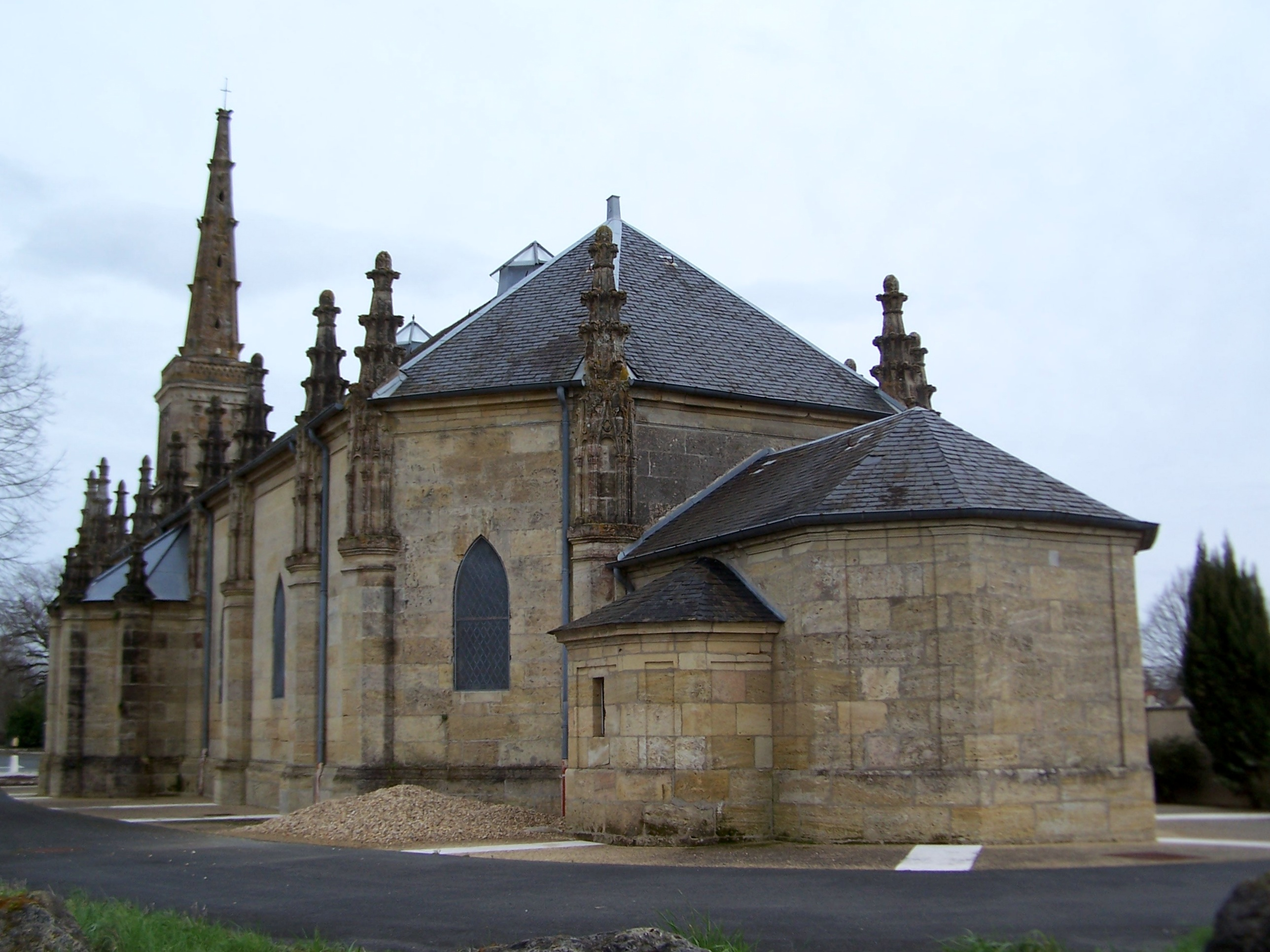 Église de Saint-Vincent-de-Paul (Gironde, France)